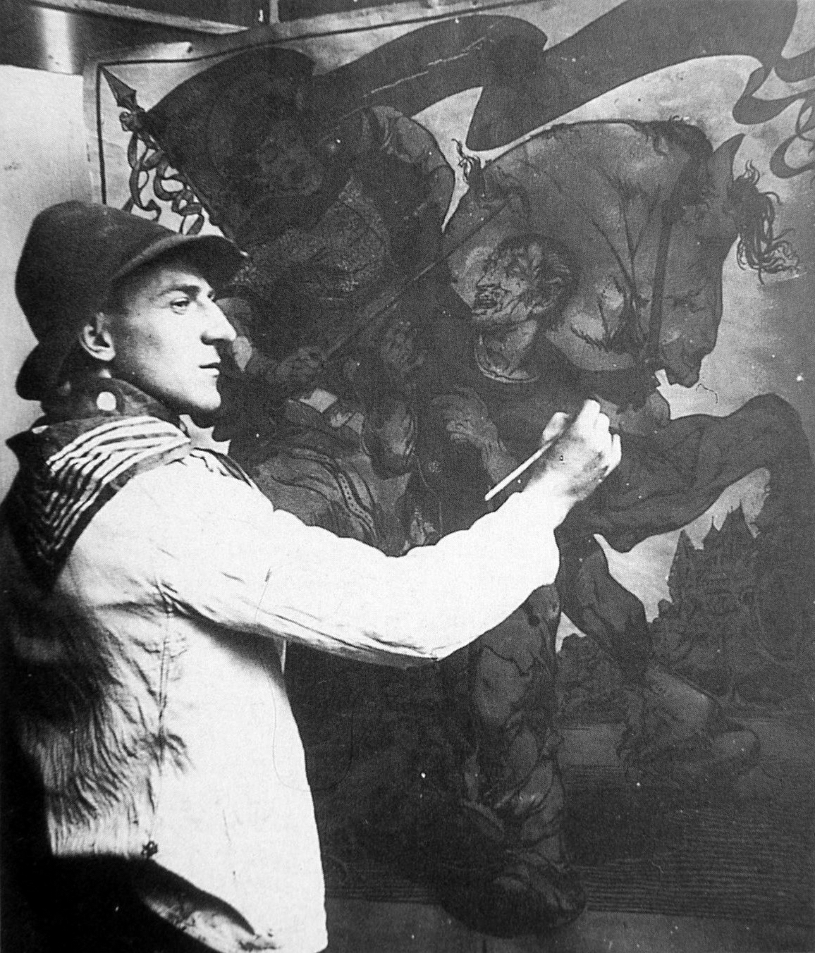 Alfred Ost in zijn atelier in de Brusselse Poort te Mechelen, 1909.